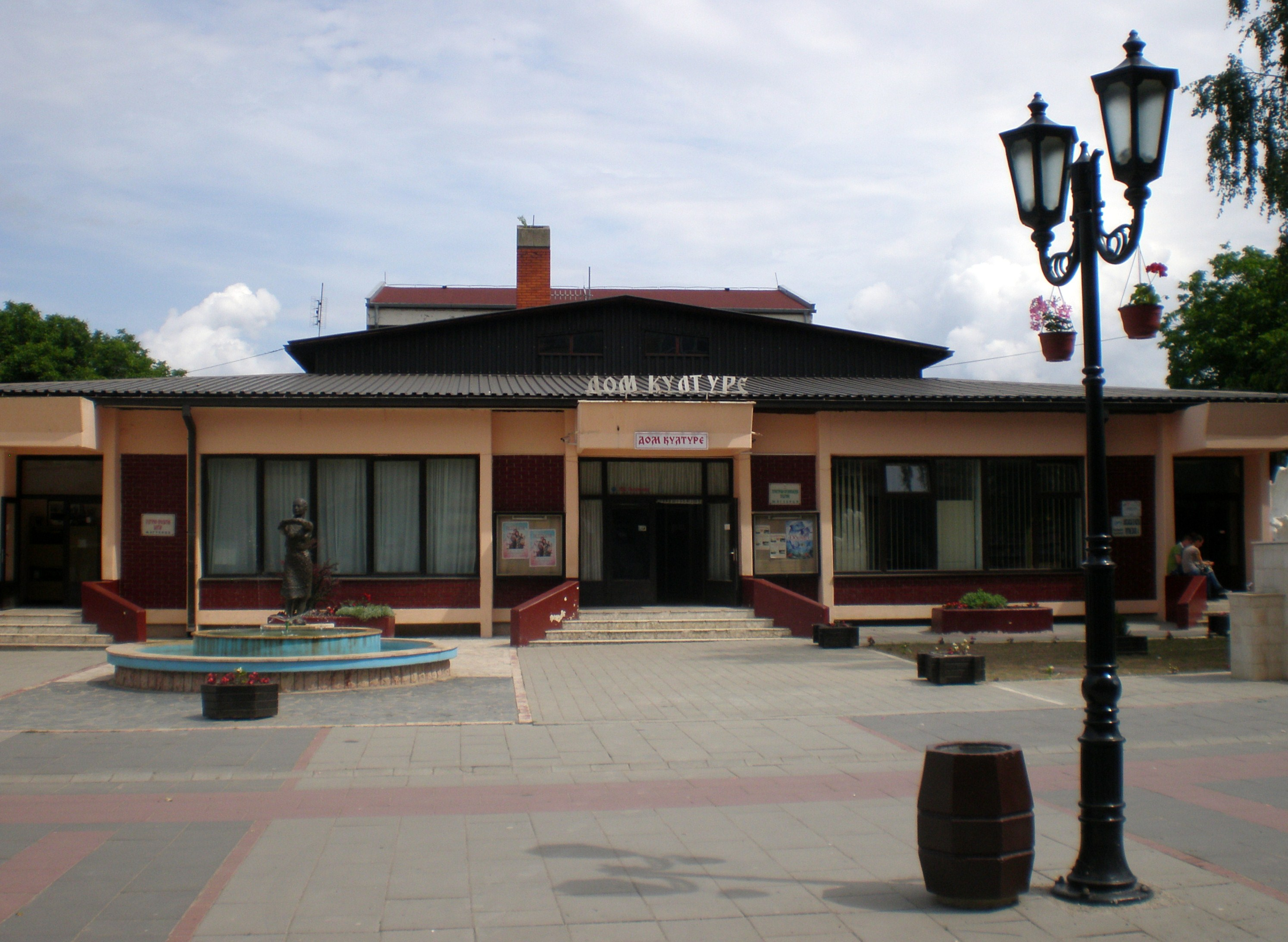 Дом културе у Жагубици.